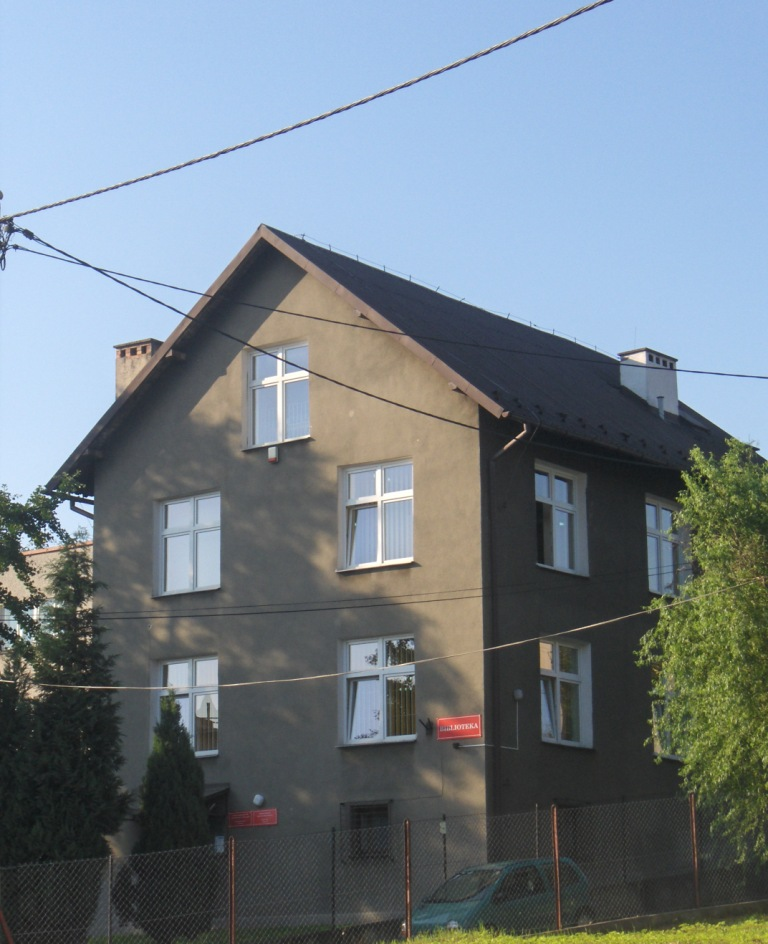 Biblioteka powatowa